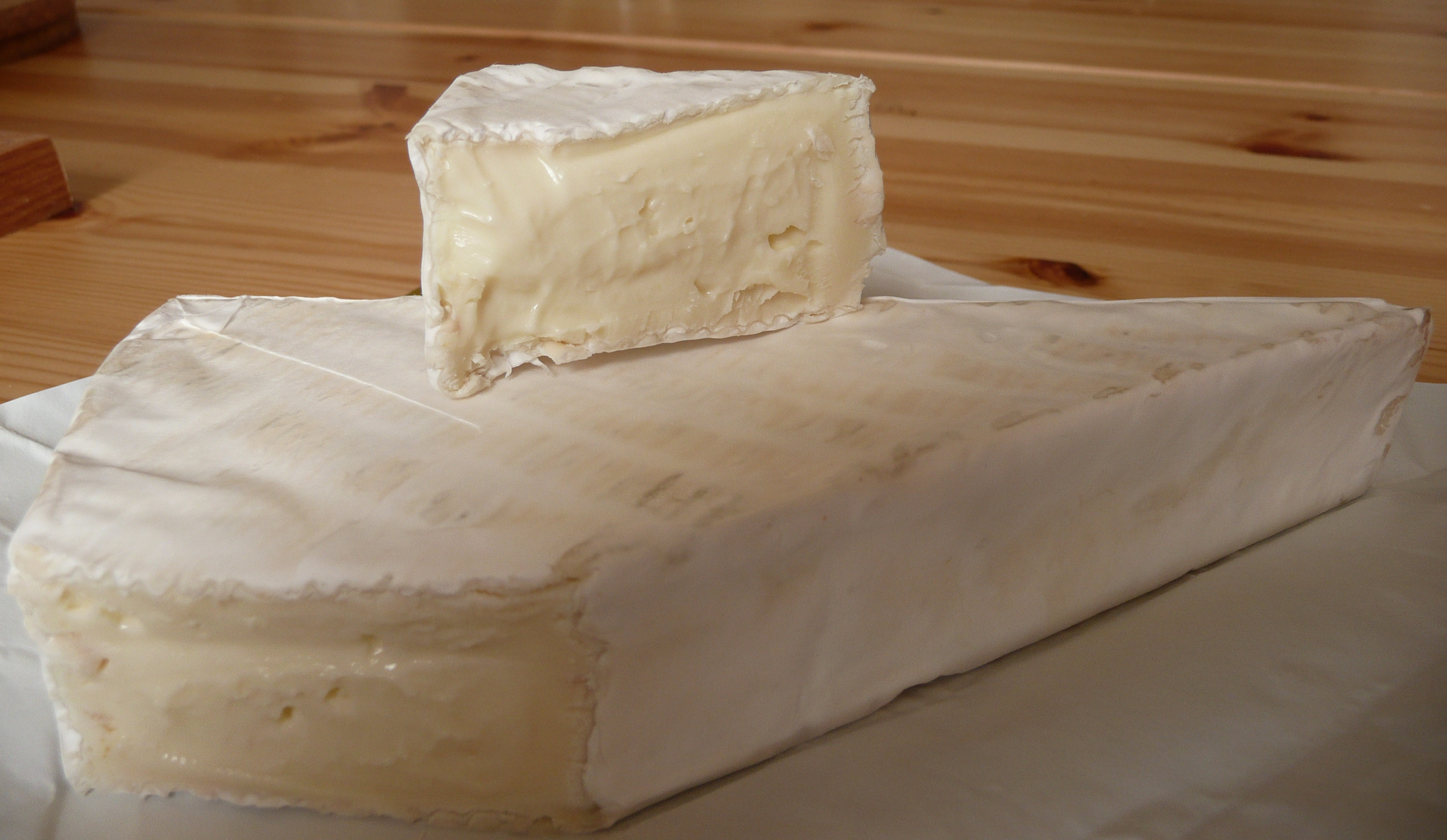 Pointe de brie de 200 grammes, 32 % de matière grasse sur produit fini.